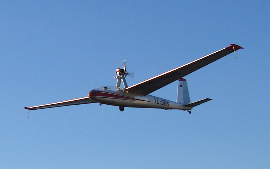 Motorglider LET L-13M Blanik over Vecaki, Riga - Latvia